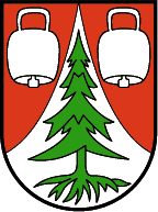 Schoppernau, Vorarlberg: Ein roter, von einer aufsteigenden, silbernen Spitze durchzogener Schild. Die Spitze ist mit einer natürlichen, entwurzelten, abgeledigten Tanne belegt und von je einer silbernen Kuhglocke begleitet. Den Schild umgibt eine ornamentierte bronzefarbene Randeinfassung. (Verleihung: 12. März 1930)